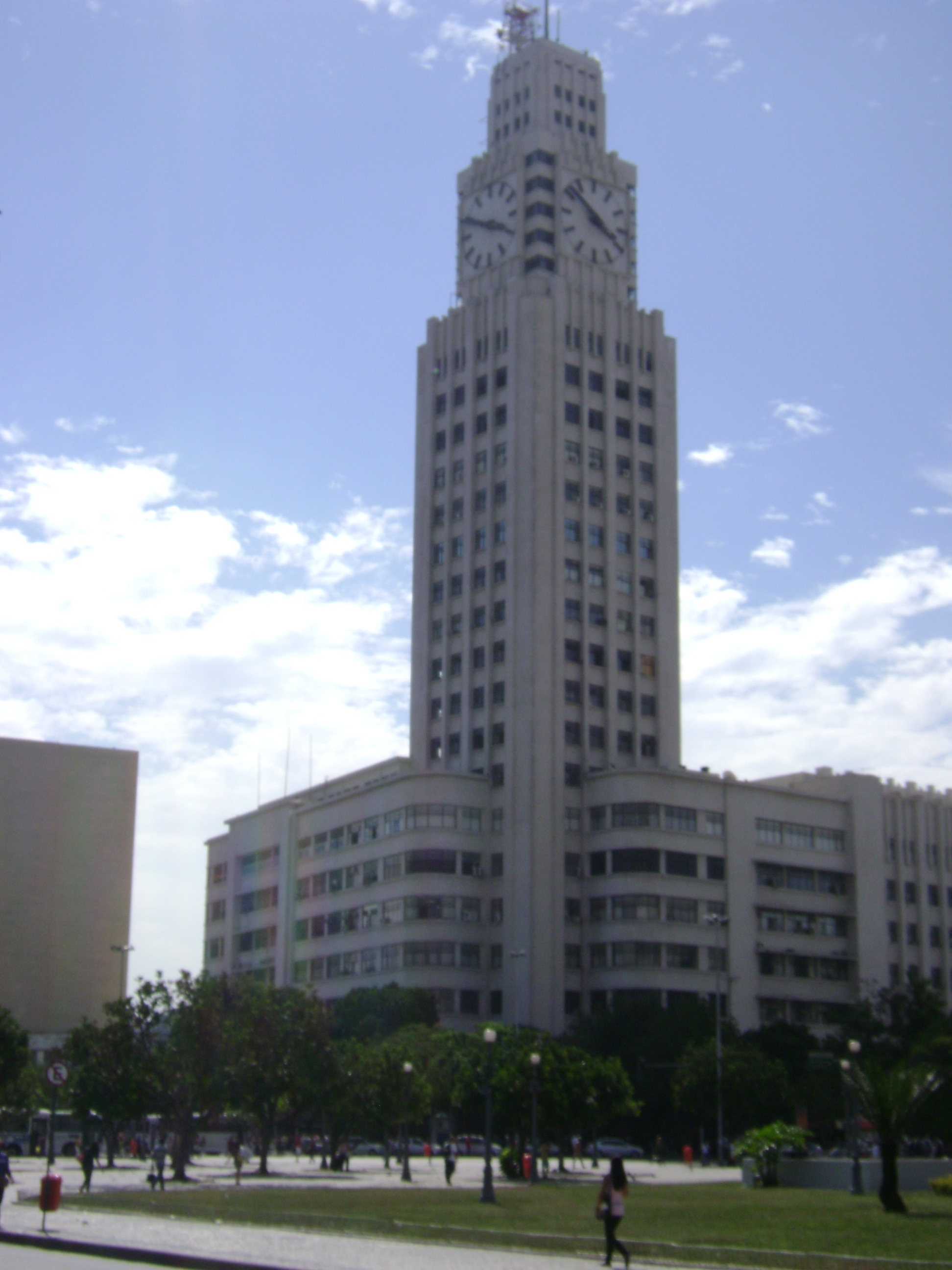 Torre da estação Central do Brasil, na cidade do Rio de Janeiro.